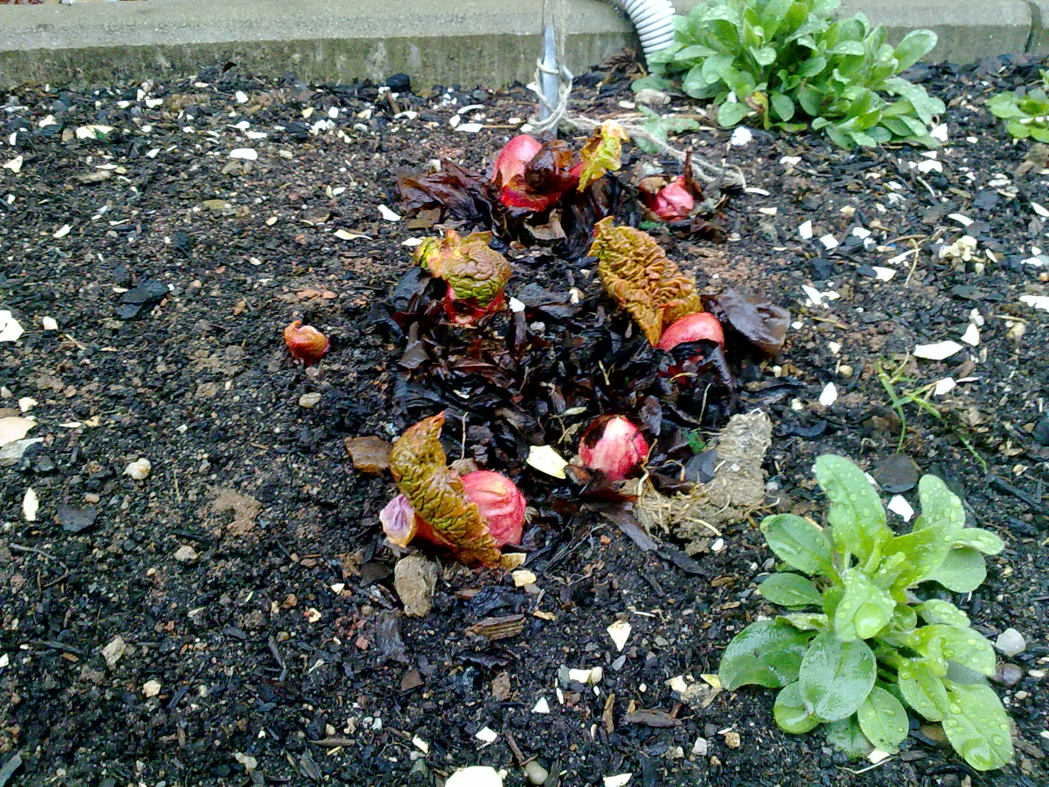 Rhabarber beim Austreiben